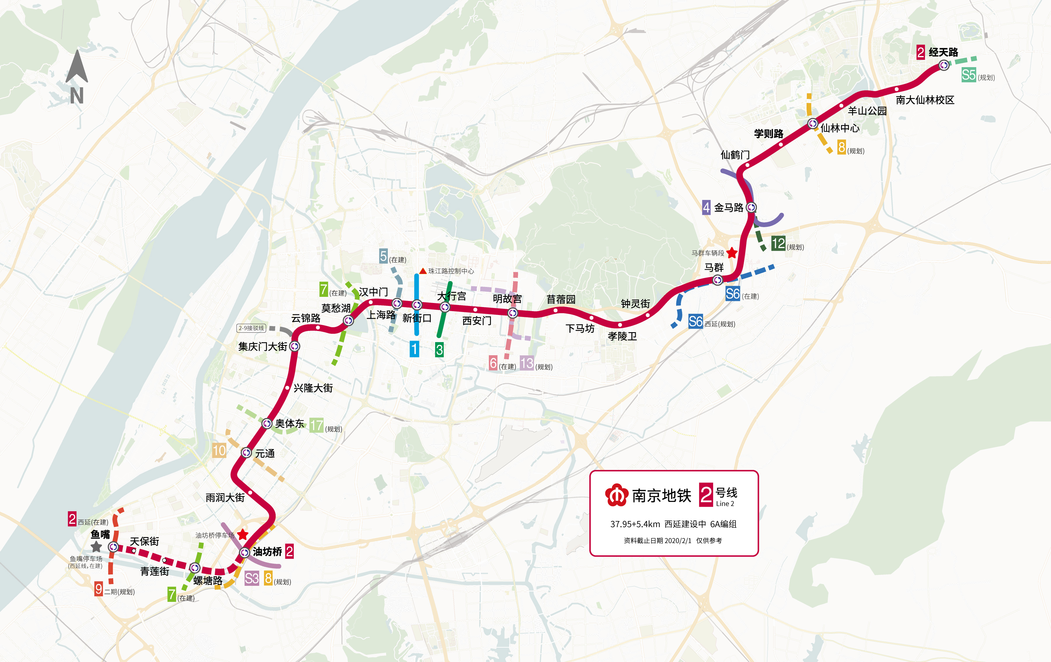 南京地铁2号线线路图(含西延线)，资料时效性截止日期2020年2月1日